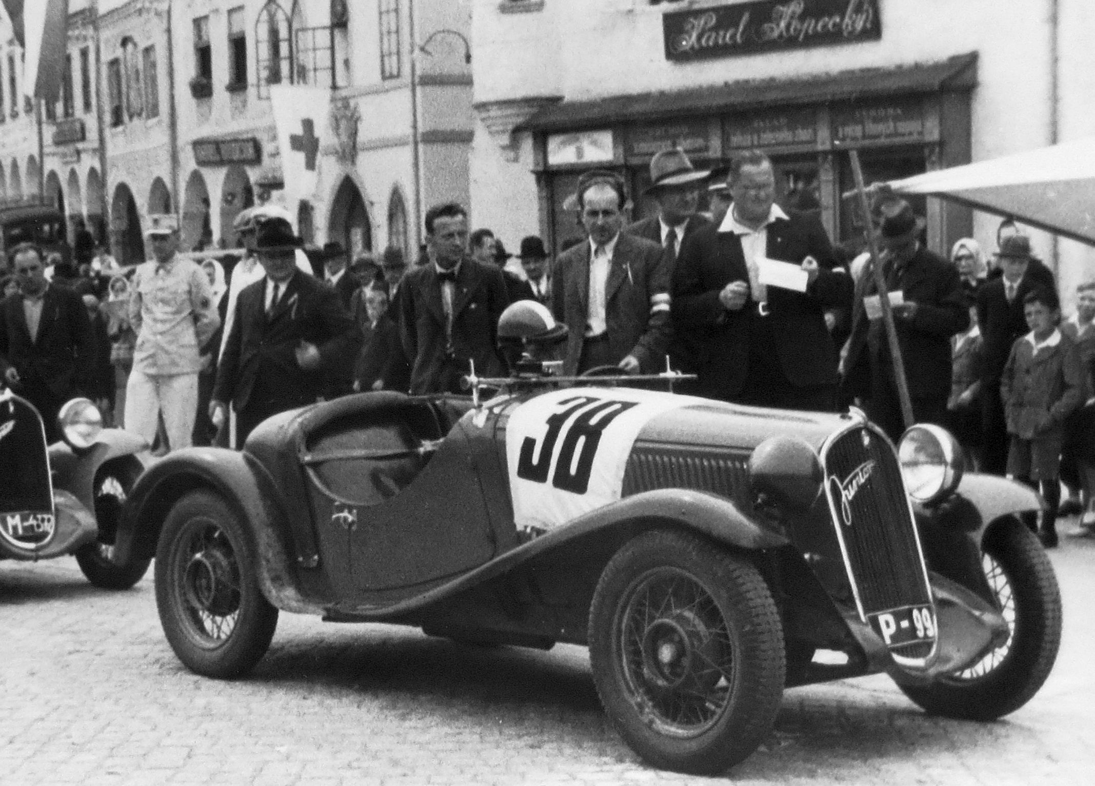 Walter Junior SS, Ivan Hodáč na startu v Telči (1934)